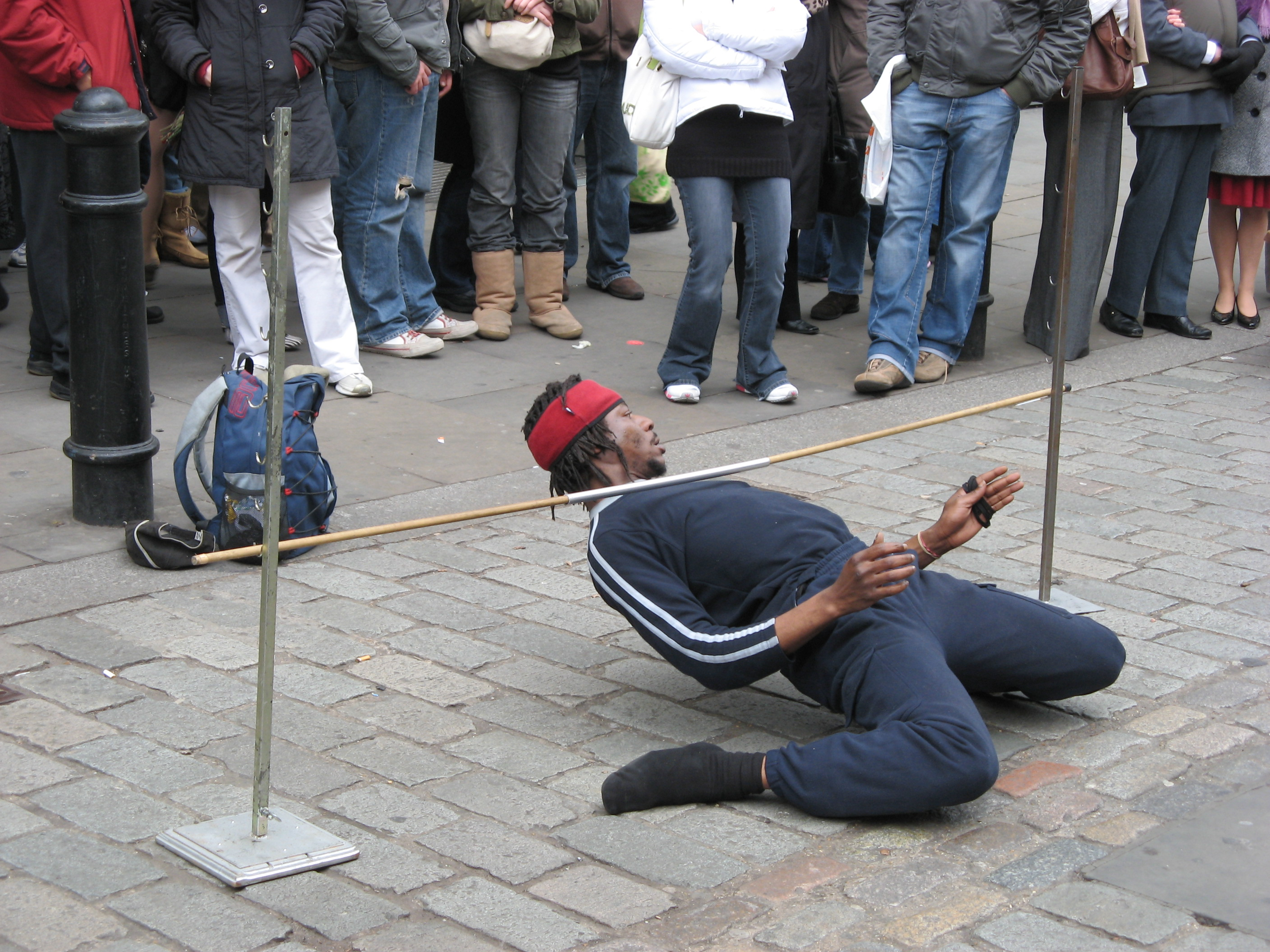 Street limbo 3